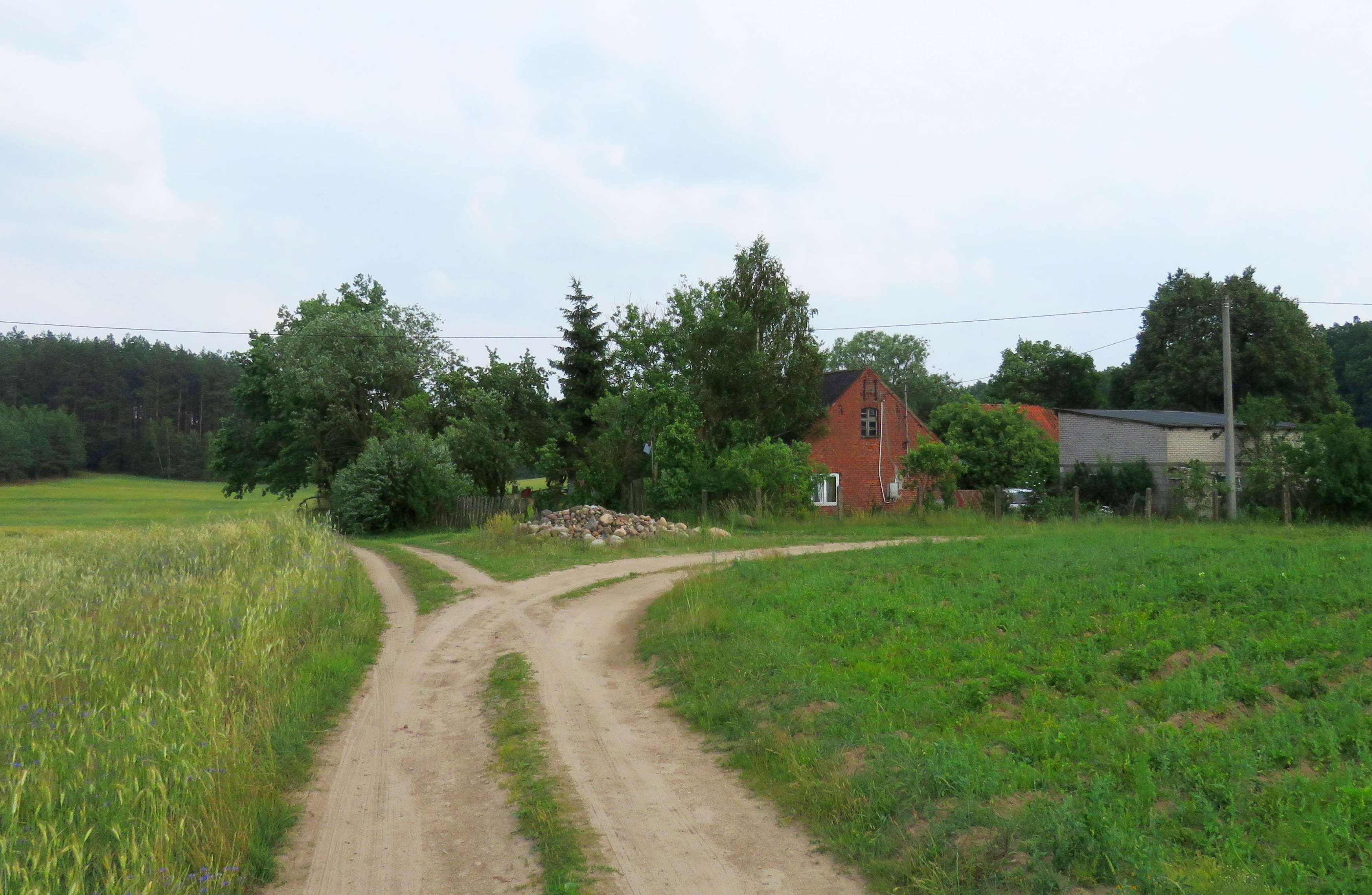 Leszczyniak, gm.Biskupiec